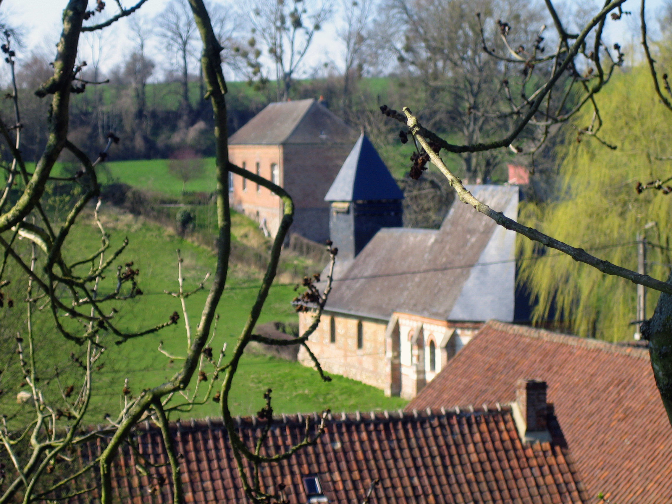 Vaux-Marquenneville (Somme, France) - L'église de Vaux se dresse au fond de la petite vallée , en arrière plan se trouve la Mairie.